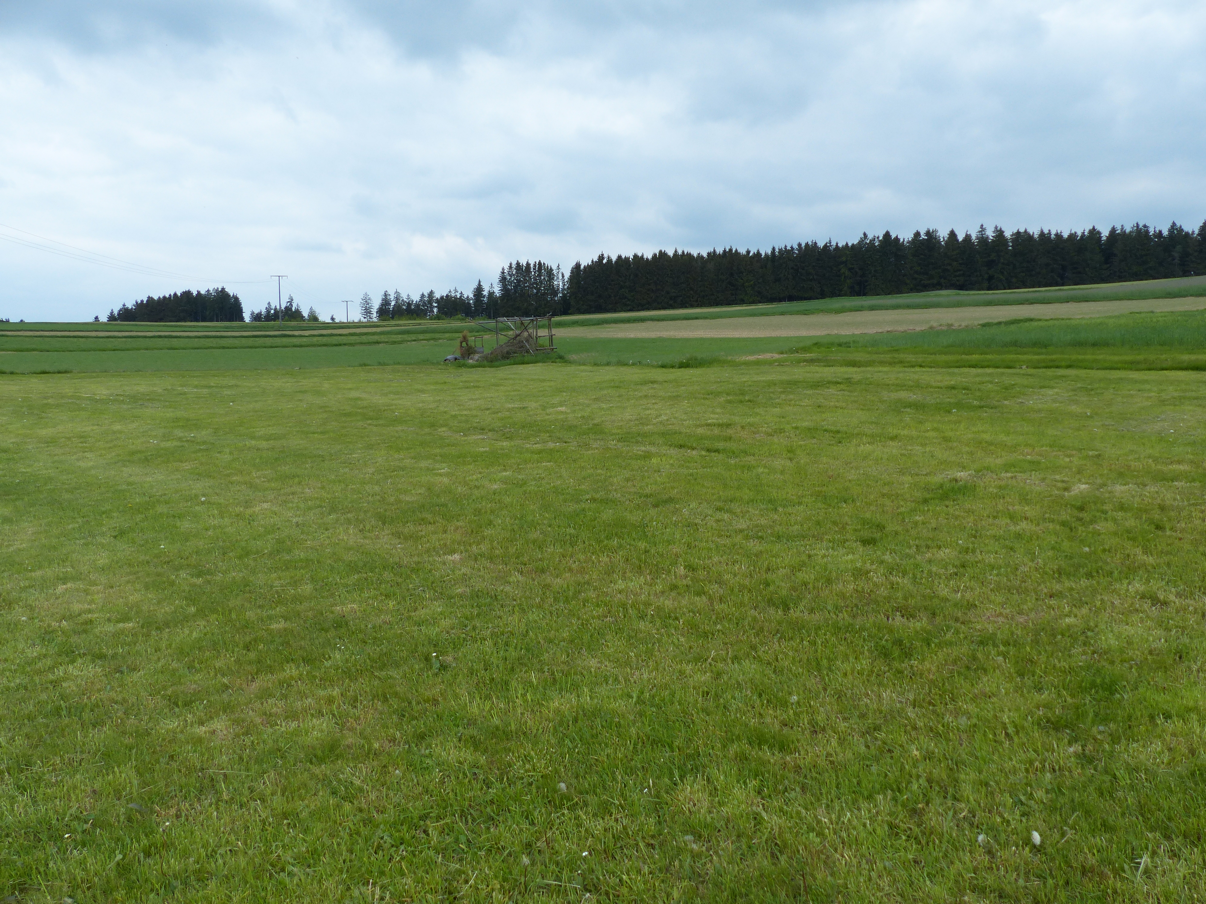 Areal der Wüstung Hilkersreuth, Überreste des Brunnens